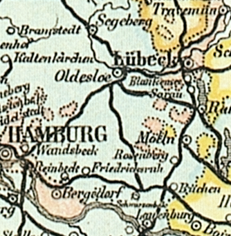 Ausschnitt LBE aus der Bahnkarte_Deutschland_1899